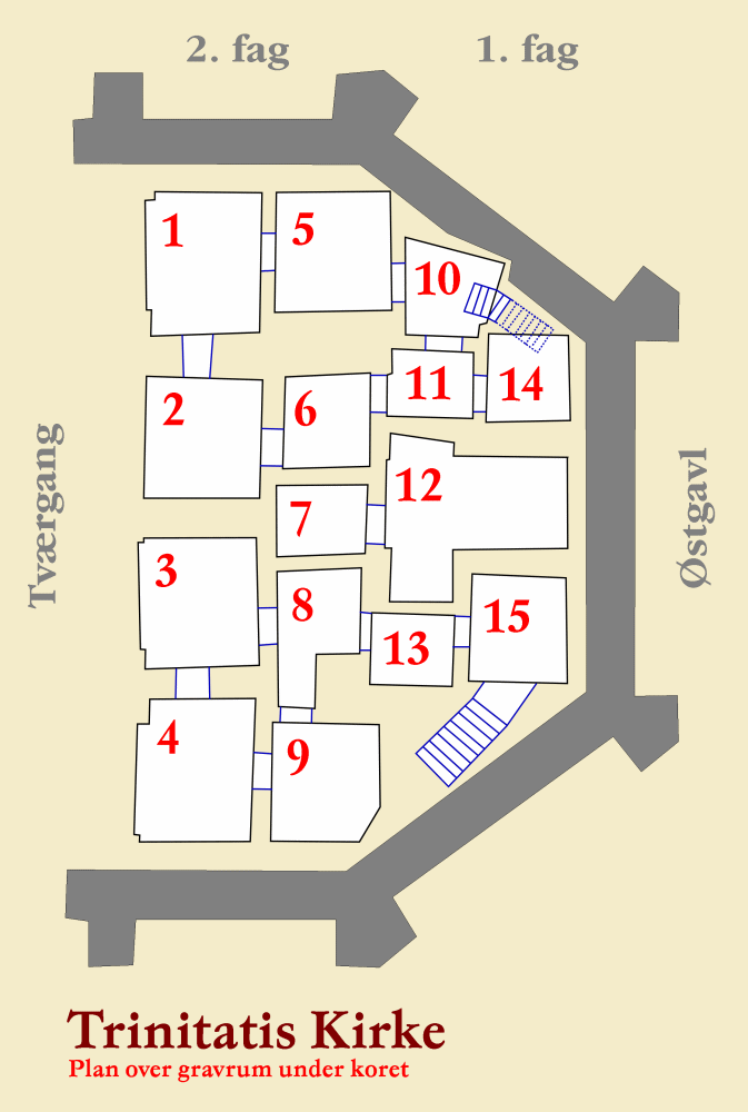 Trinitatis Kirke, Copenhagen, Denmark. Kort over krypten under koret.